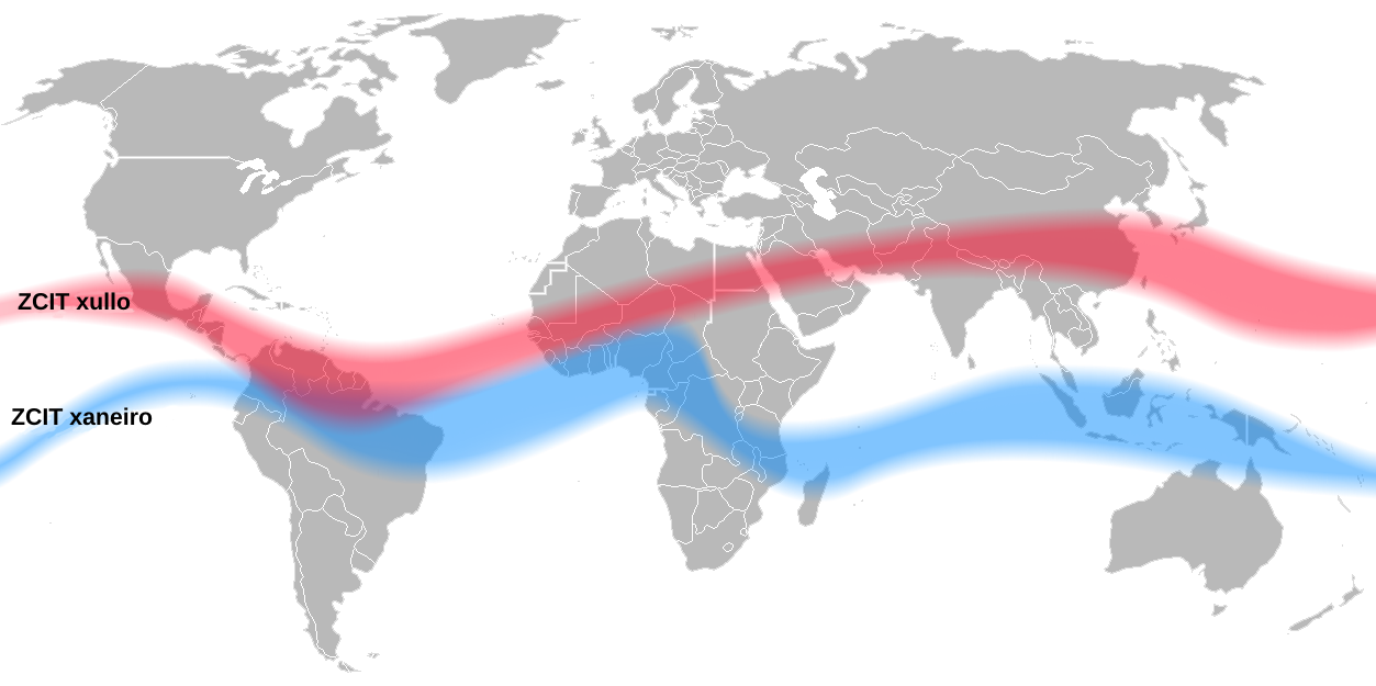 Posición da zona de converxencia intertropical en xullo e xaneiro